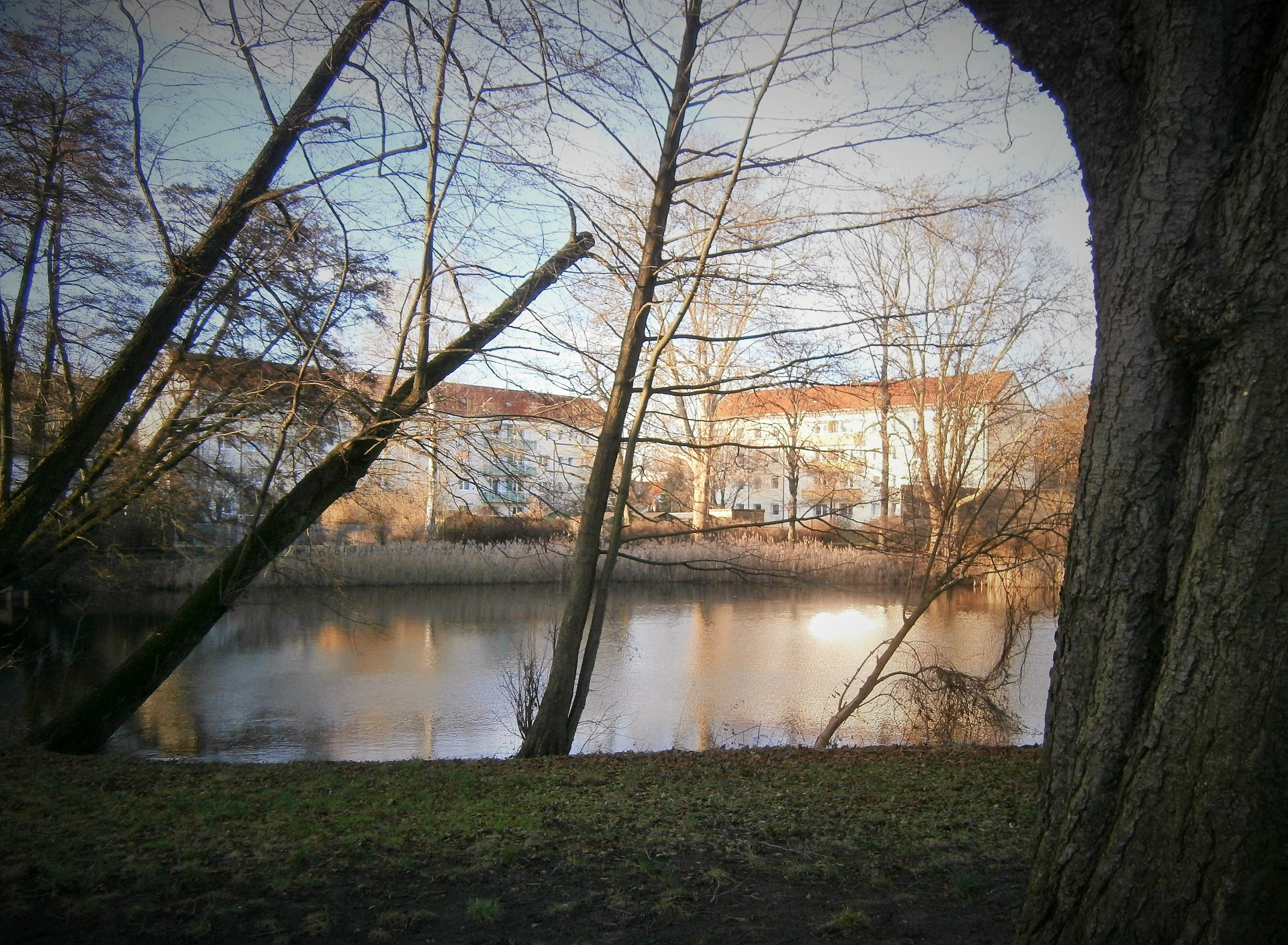 Garibaldistraße ist eine Straße in Berlin-Wilhelmsruh. Hier Blick zum Garibalditeich.